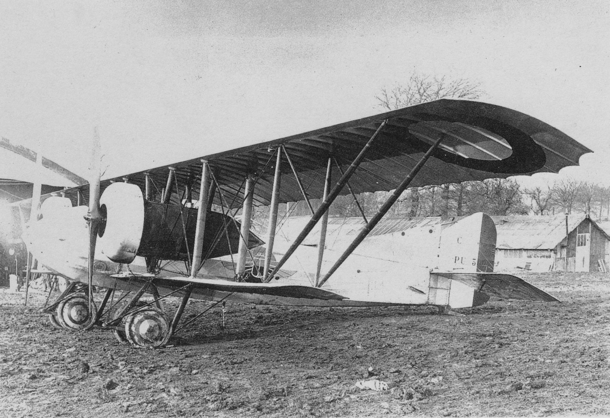 Caudron G.VI, aereo da ricognizione bimotore biplano; l'esemplare ritratto porta il simbolo della escadrille C 56, data e luogo sconosciuti.